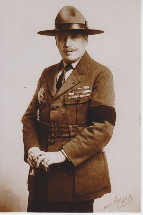 Arthur Guyot d'Asnières de Salins, Général de Division, chef des Scouts de France de 1922 à 1936